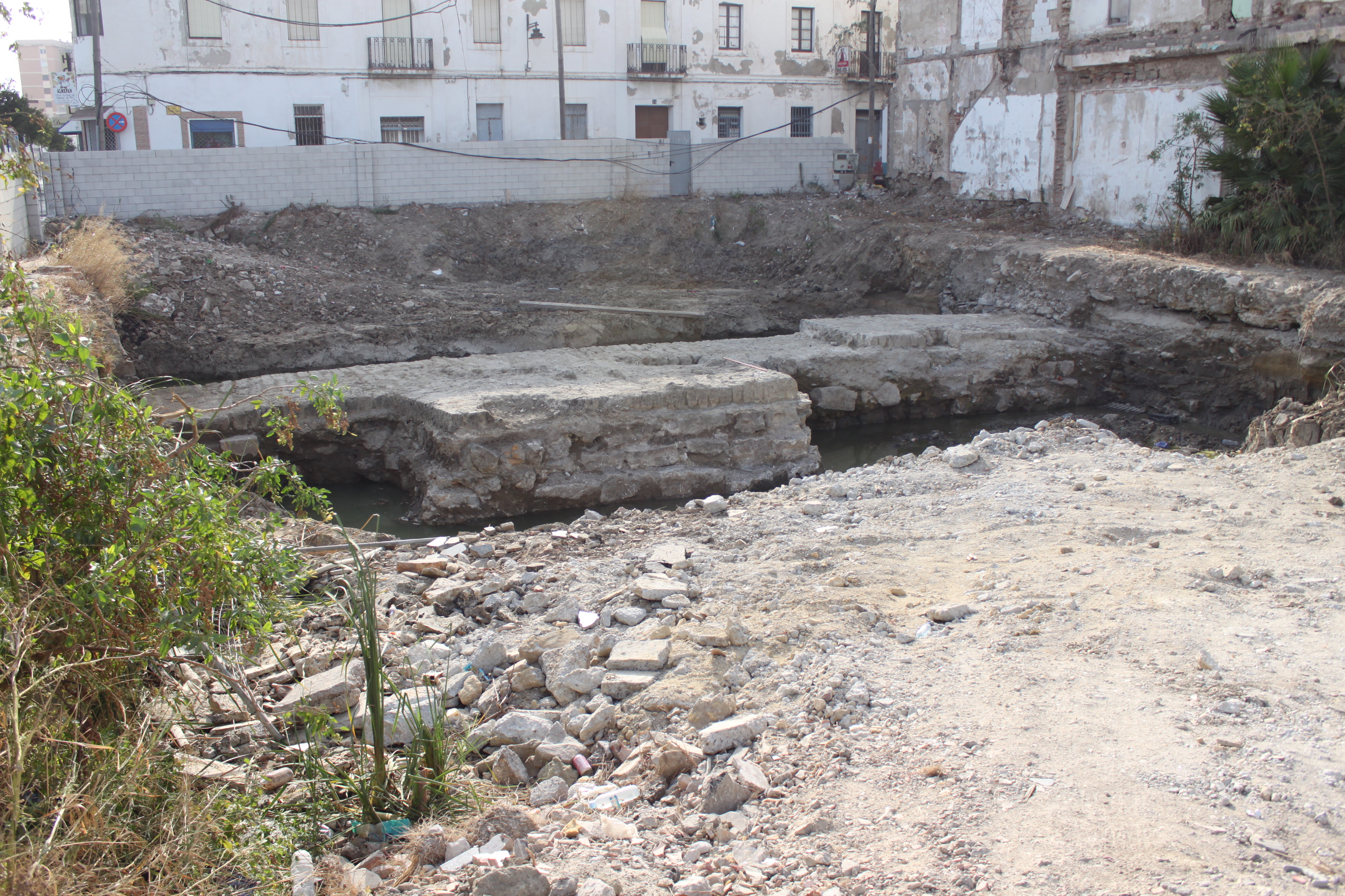 Restos de las atarazanas califales localizadas en la Avenida de La Marina de Algeciras. Se observan los restos de un muro de 22 metros de longitud, 3,20 de anchura y una altura de 1,50 metros como máximo y de una torre construidos con sillares a tizón con argamasa. Estos restos se encuentran desde 2012 ubicados en el Paseo del río de la Miel. Algeciras, Andalucía, España.